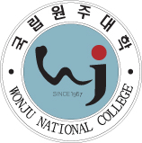 원주대학의 로고